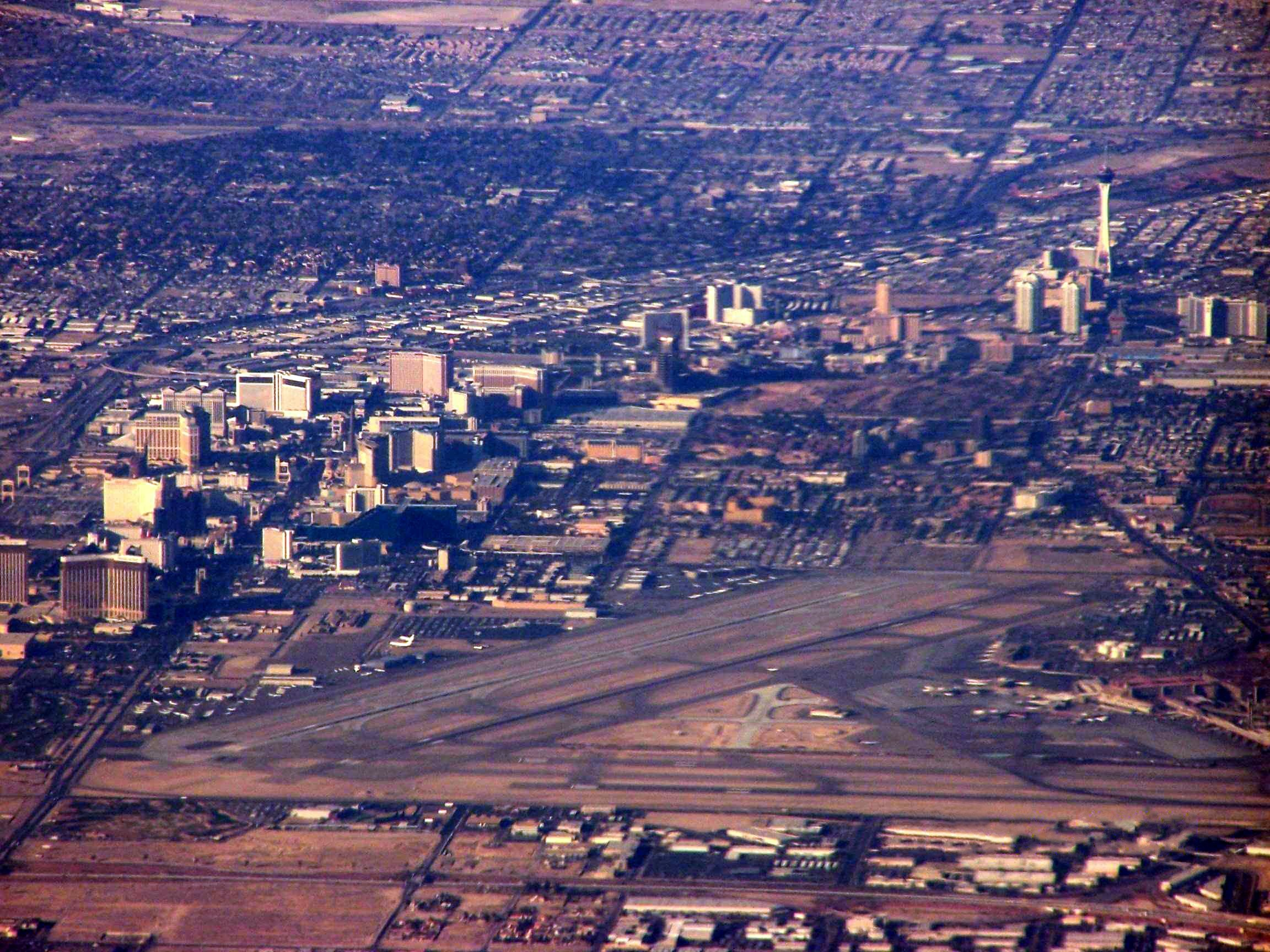 USA Nevada Las Vegas